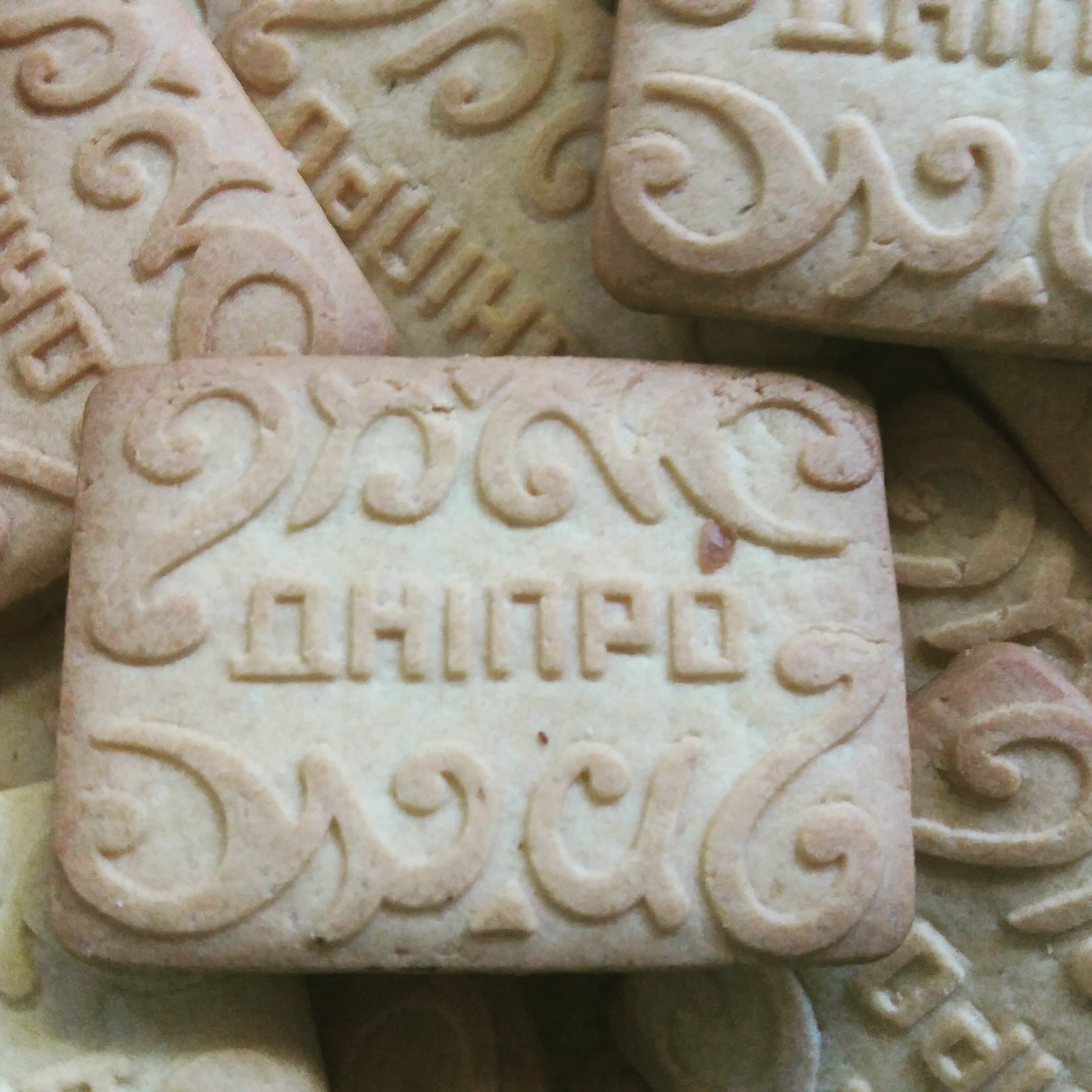 Печиво Дніпро на Дніпровськім хлібокомбінаті №5.